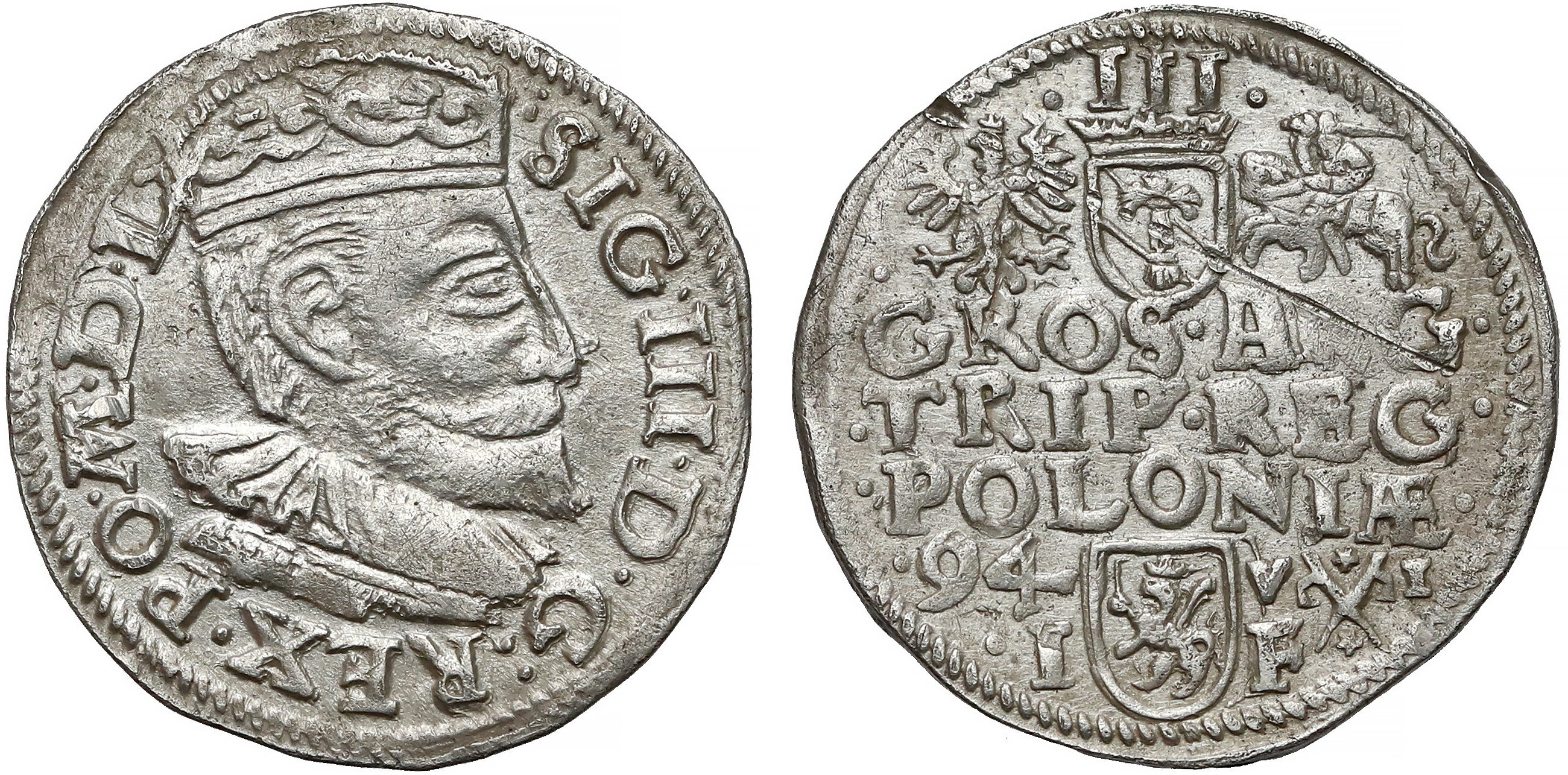 Trojak 1594 Poznań